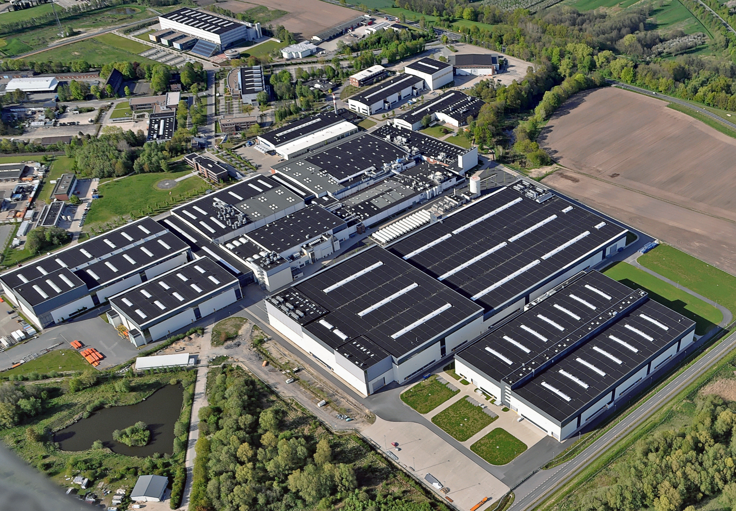 Stade-Süd. Luftbilder von der Nordseeküste 2012-05. Das Airbus-Werk in Stade